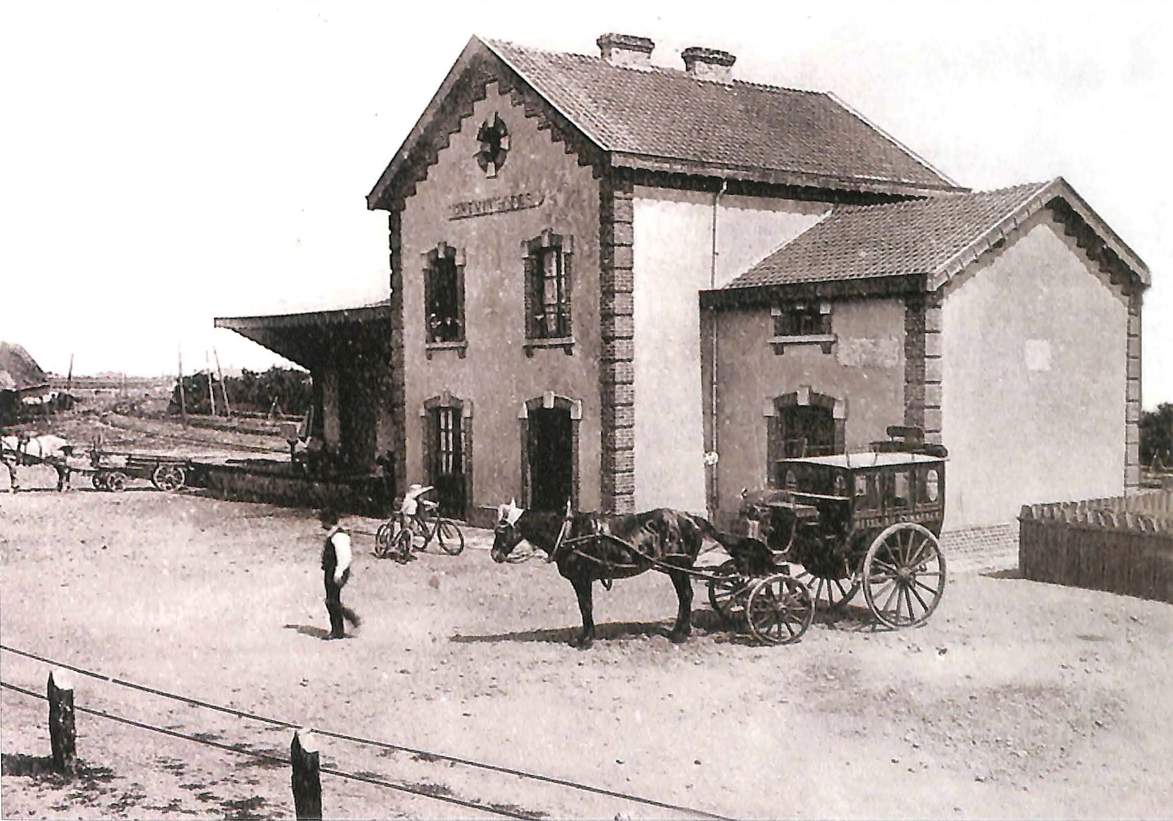 Ancienne gare de Marines, avant la Première Guerre mondiale / Ligne de Valmondois à Marines / France.